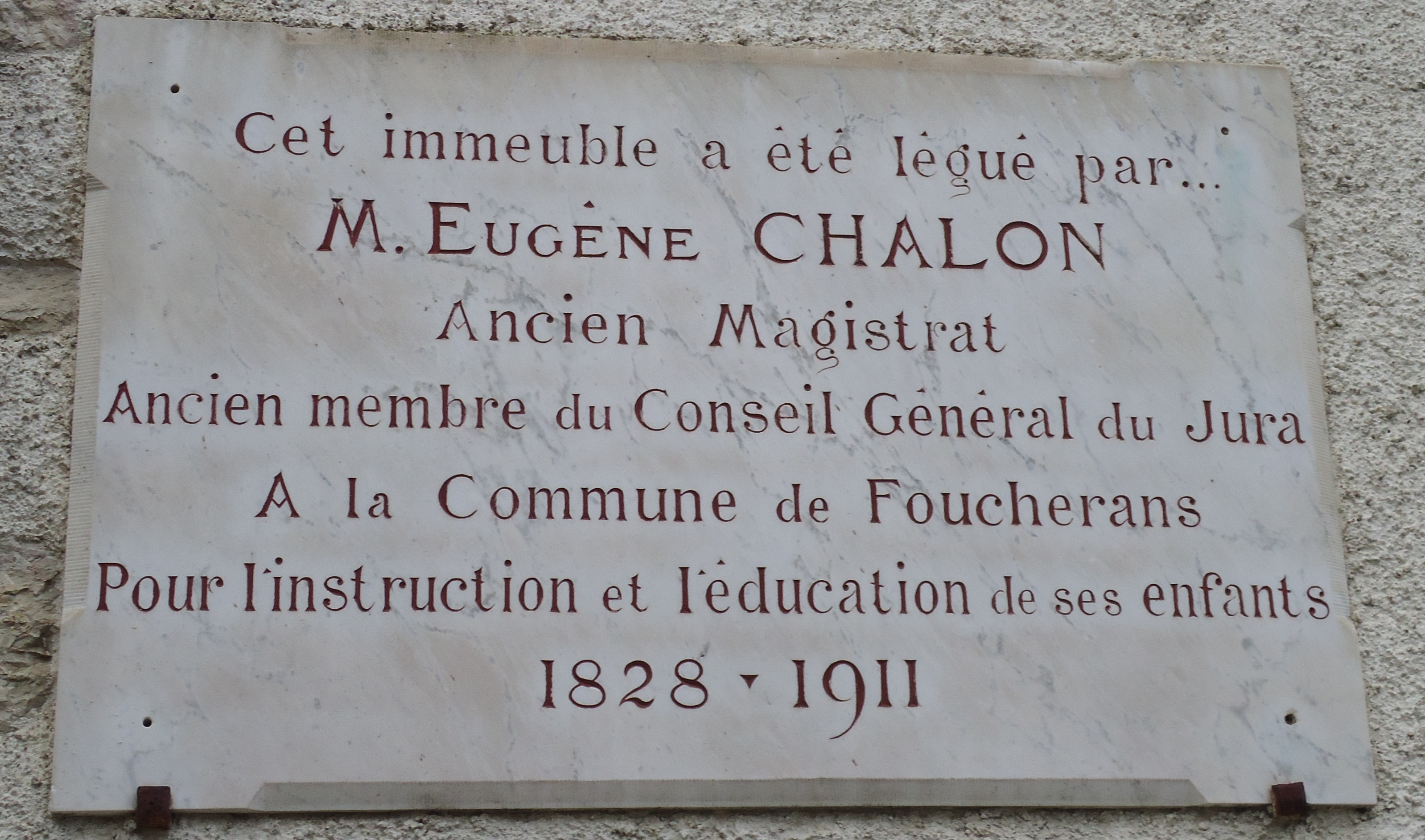 Plaque dédiée à Eugène Chalon à Foucherans (39)